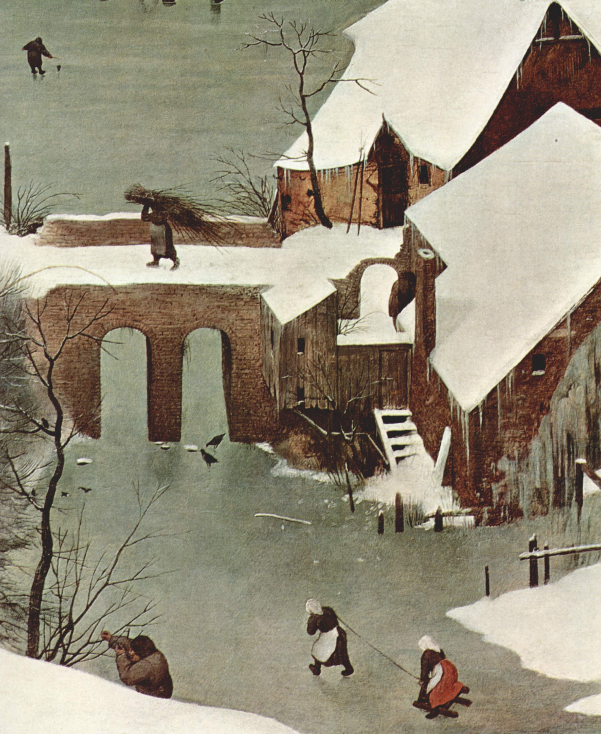 Eine gefrorene Wasserfläche mit Brücke. Die Brücke wird von einer Reisigsammlerin überquert. Im Vordergrund befinden sich zwei Kinder mit einem Schlitten auf dem Eis.